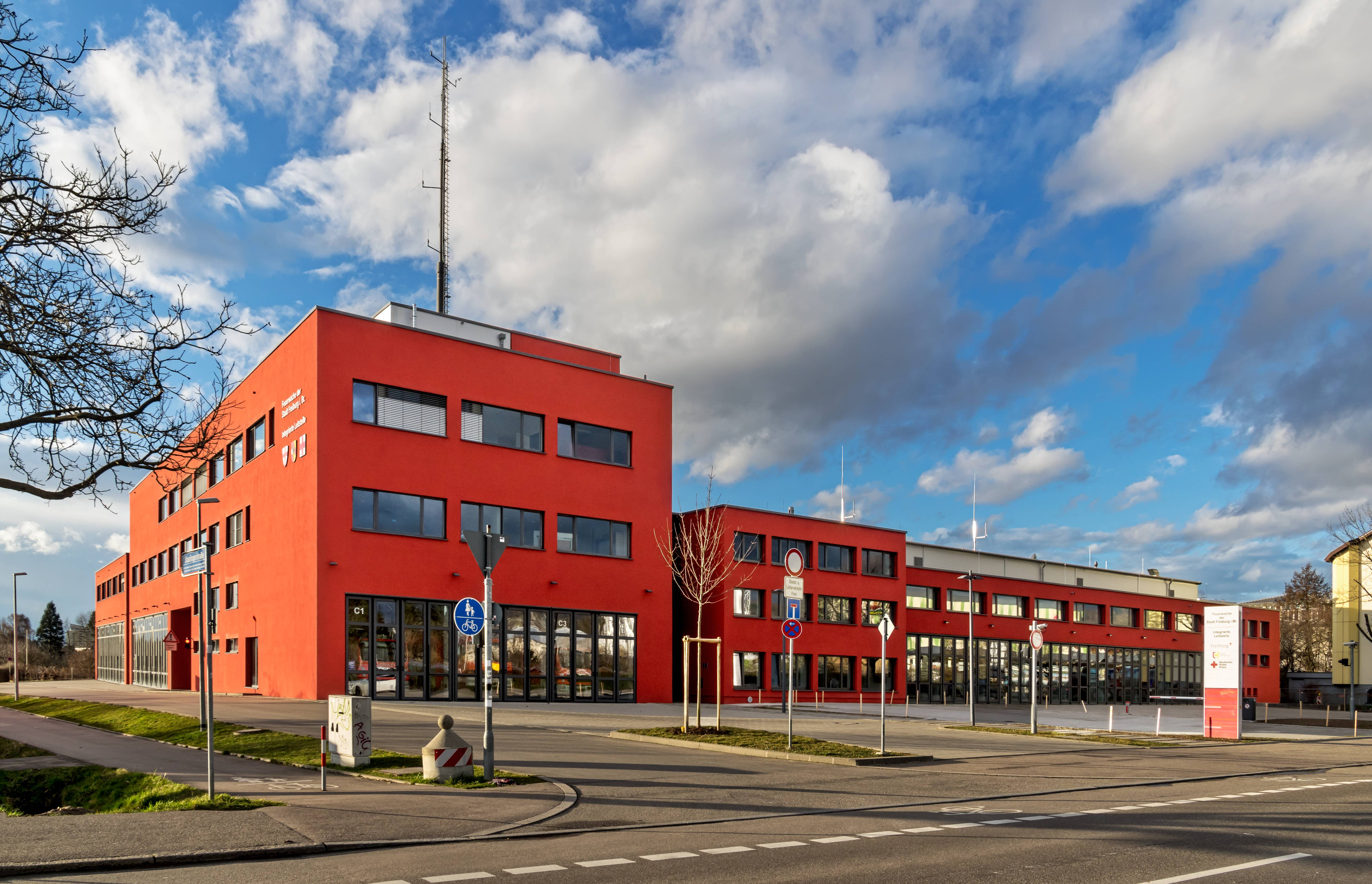 Bilder aus Freiburg im Breisgau Hauptwache der Feuerwehr Freiburg